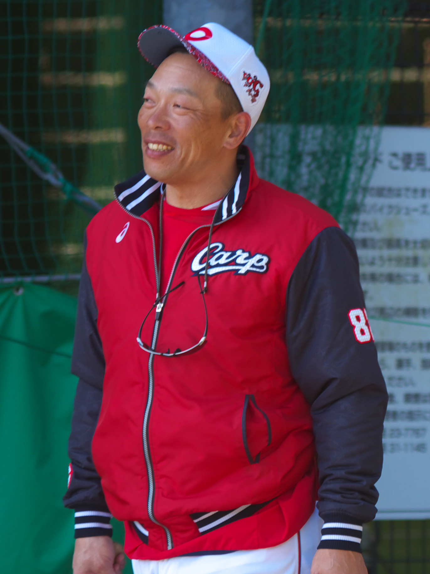 2018年2月18日 広島東洋カープ浅井樹 日南市天福球場 投稿者による撮影